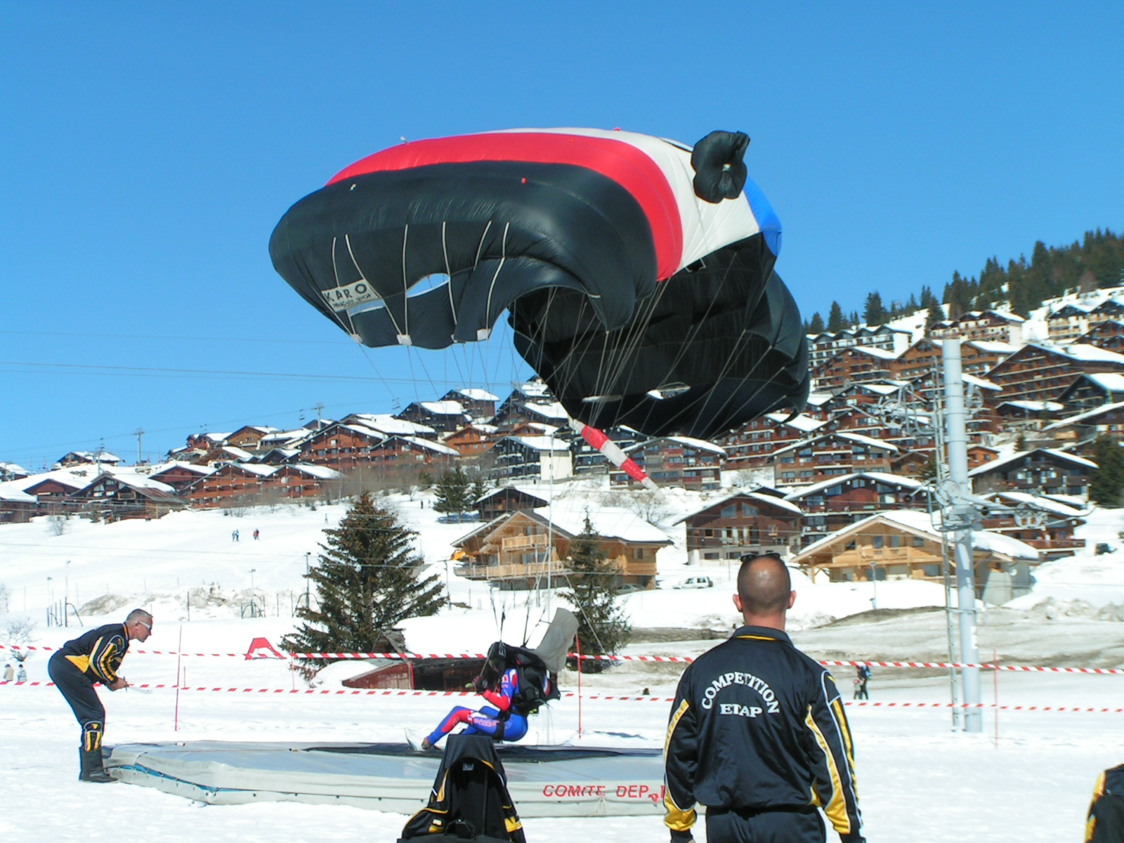 Parachutisme, Image personnelle